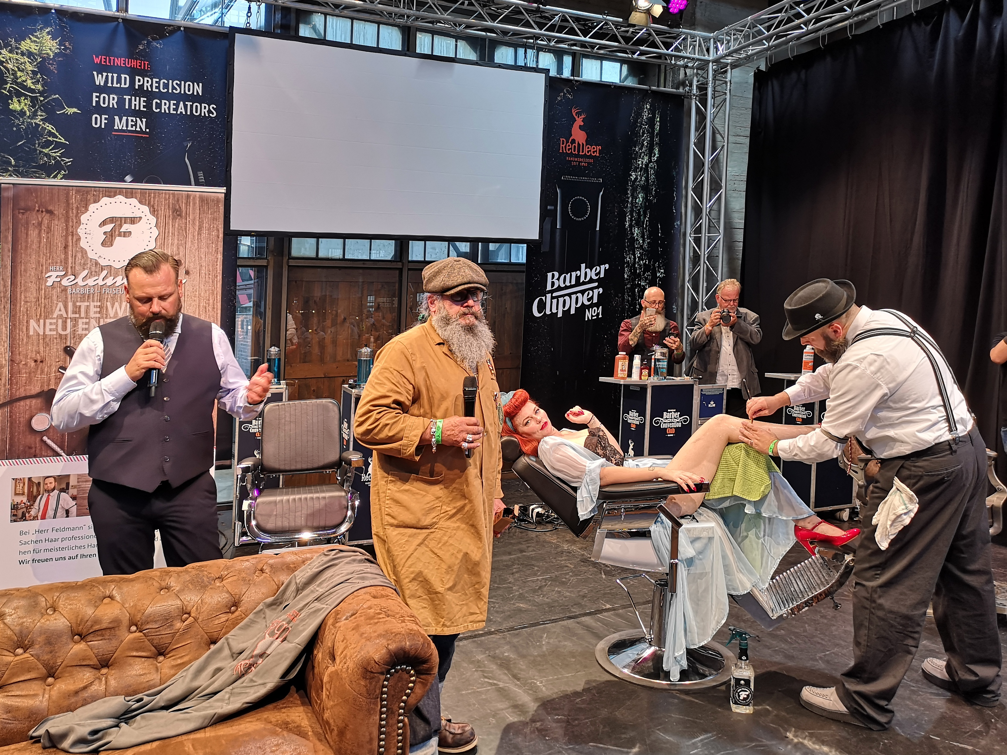 Beinrasur